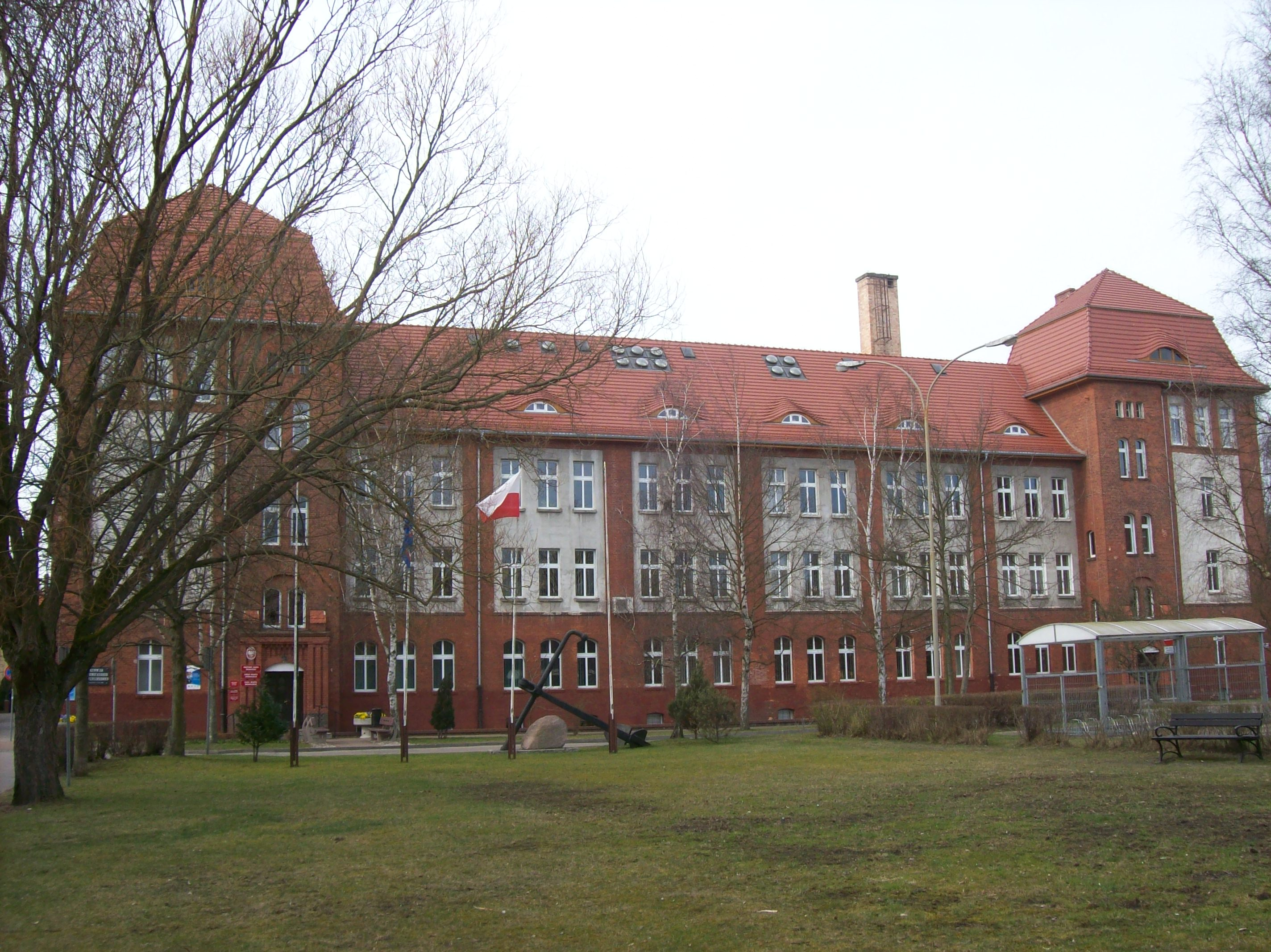 Budynek Urzędu Miasta Świnoujście